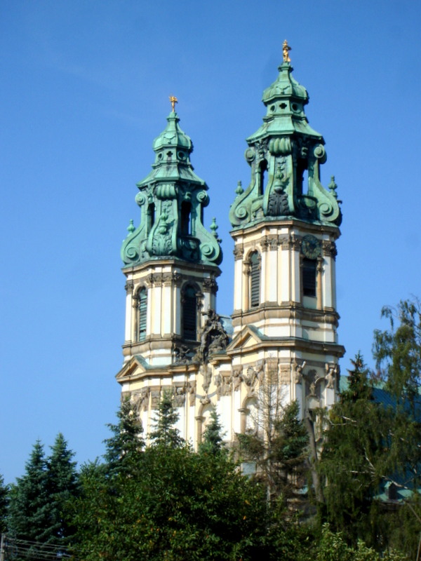 Krzeszów, kościół, ob. par. p.w. Wniebowzięcia NMP, 1728-1735